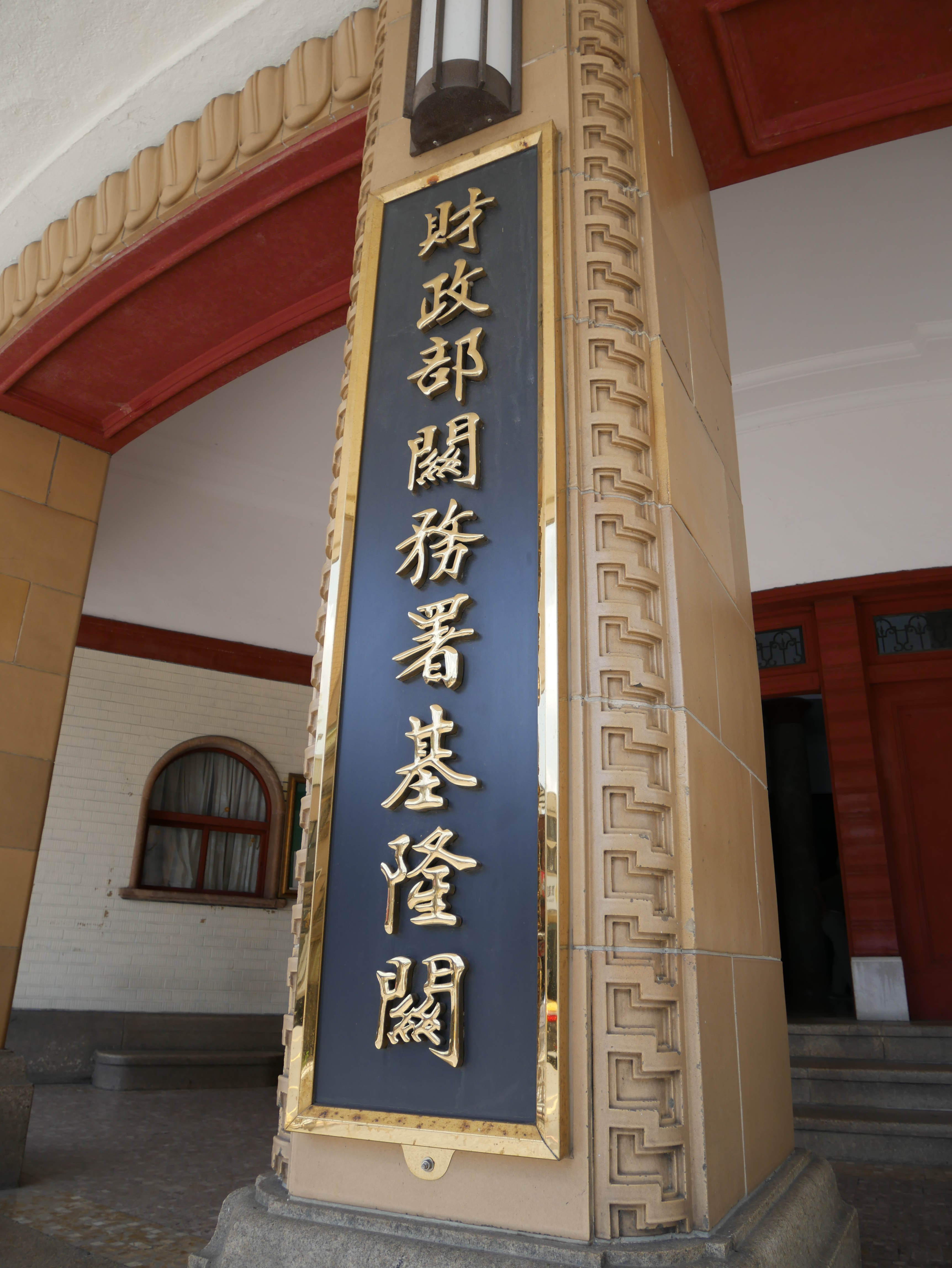 基隆海港大樓1樓大門，財政部關務署基隆關招牌。